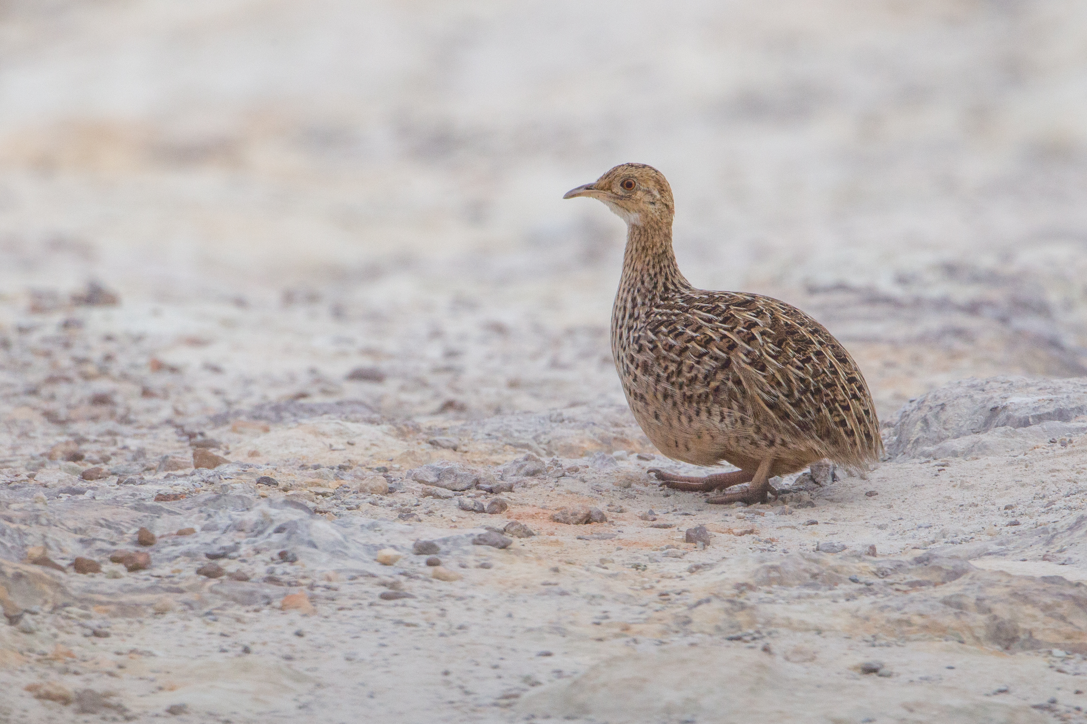 Codorna-amarela (Nothura maculosa) no Parque Nacional da Serra da Canastra